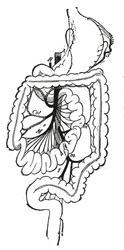 Apparato digestivo Fonte: Dichiarato di pubblico dominio secondo la lista WIKIPEDIA: Medizin Autore: Henry Gray (1821–1865). Anatomy of the Human Body. 1918. 2. The Digestive Apparatus (Apparatus Digestorius; Organs Of Digestion)